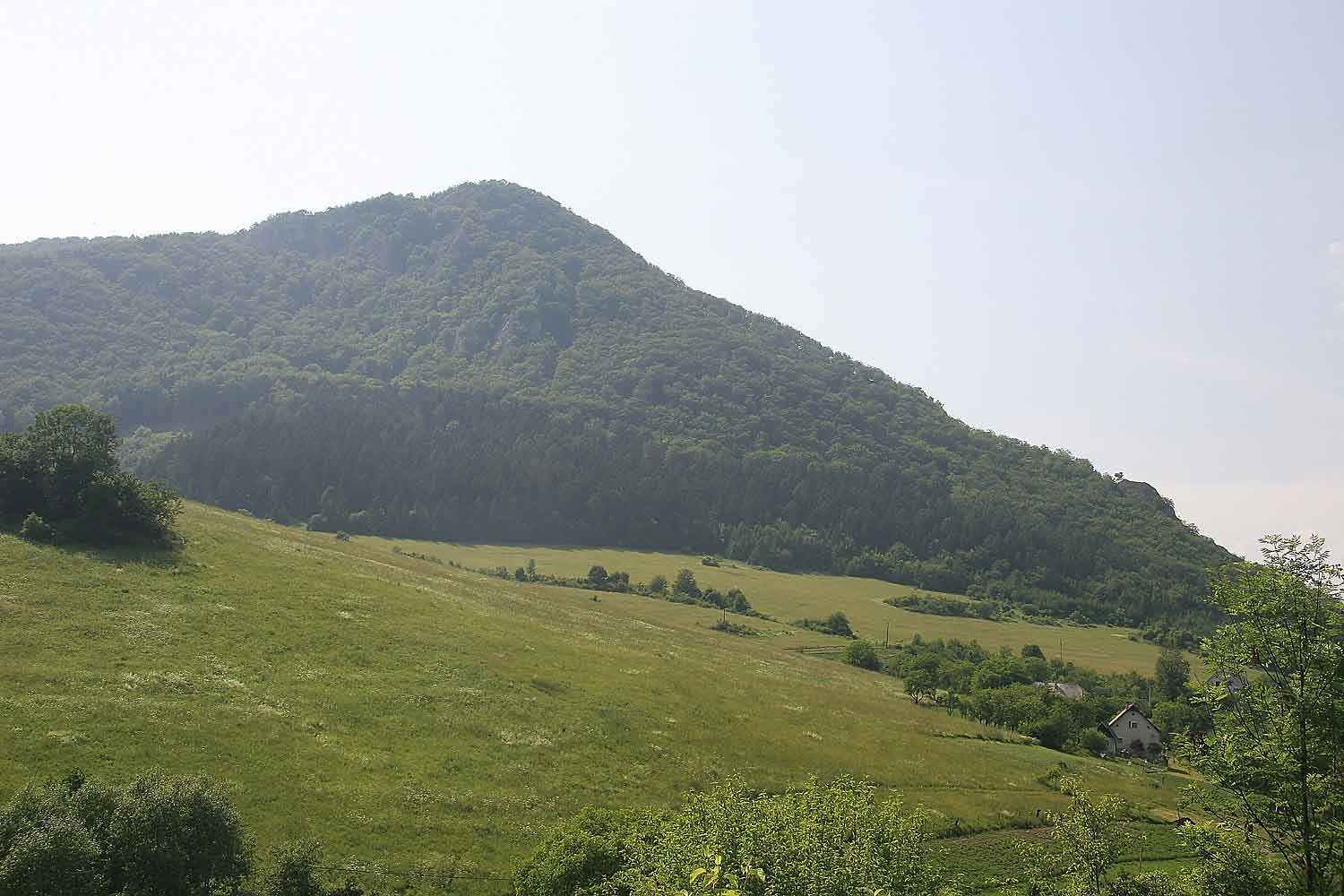 Velký Manín hill - view from village Záskalie, Súlovské vrchy, district Povážská Bystrica, Slovakia autor:Prazak Date: 27. 6. 2006